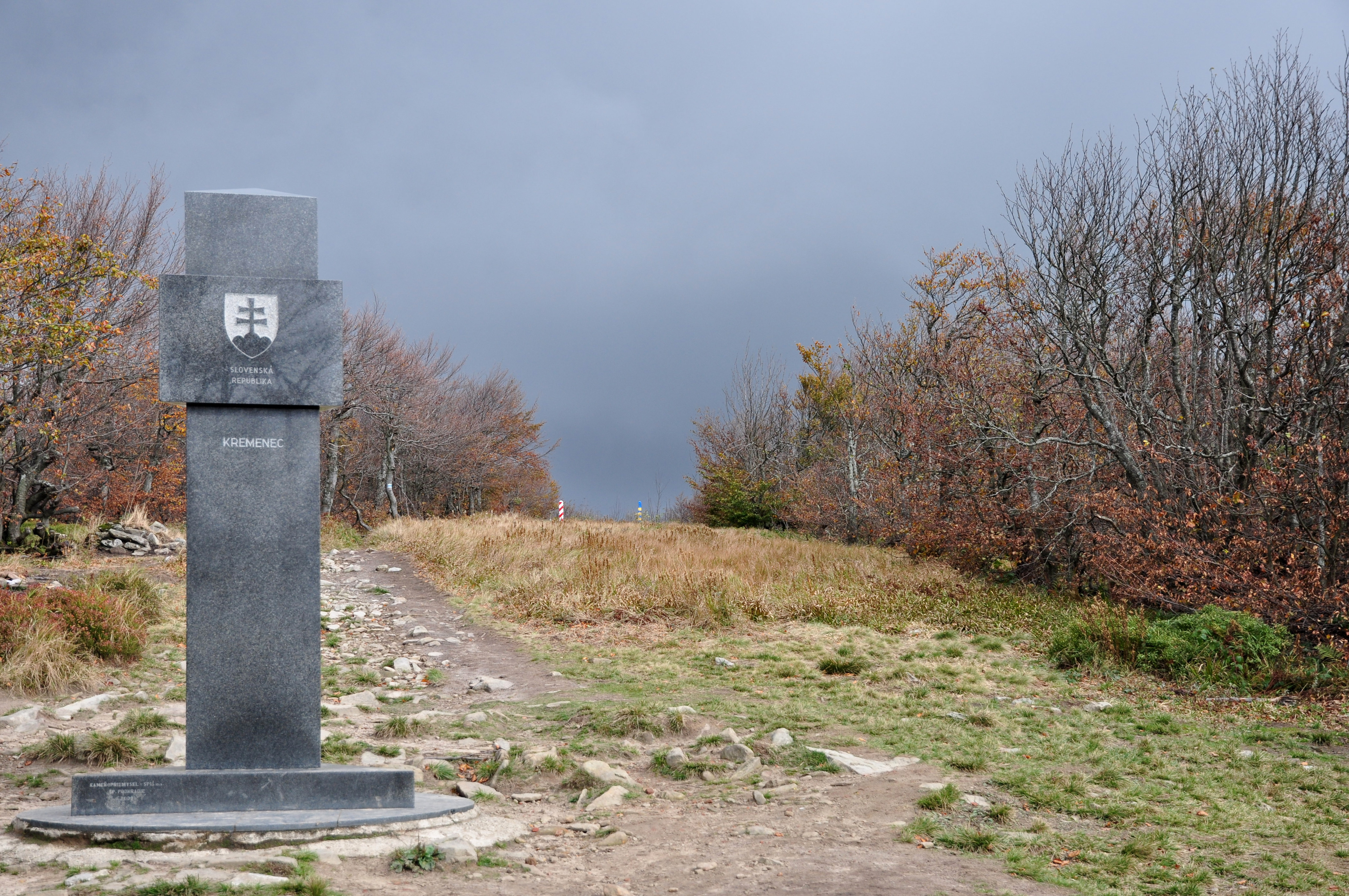 Styk trzech granic: Polska, Słowacja, Ukraina. Obelisk na Krzemieńcu. Pierwotne karpackie lasy bukowe.